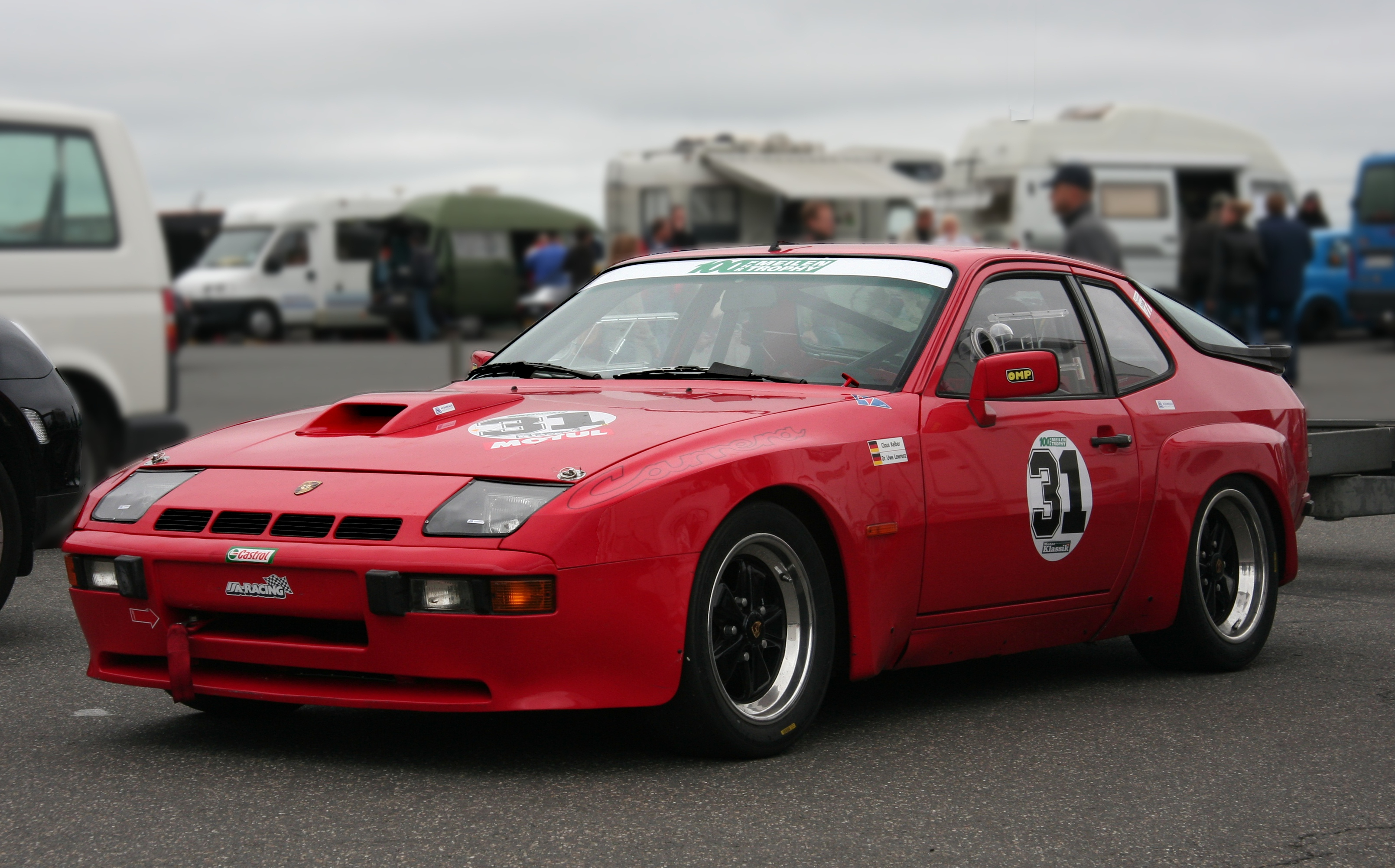 Porsche 924 Carrera GTS, 59 Stück 1981 gebaut, auf dem Parkplatz am Fahrerlager des Nürburgrings beim Oldtimer Festival des DAMC 05. Hintergrund bearbeitet